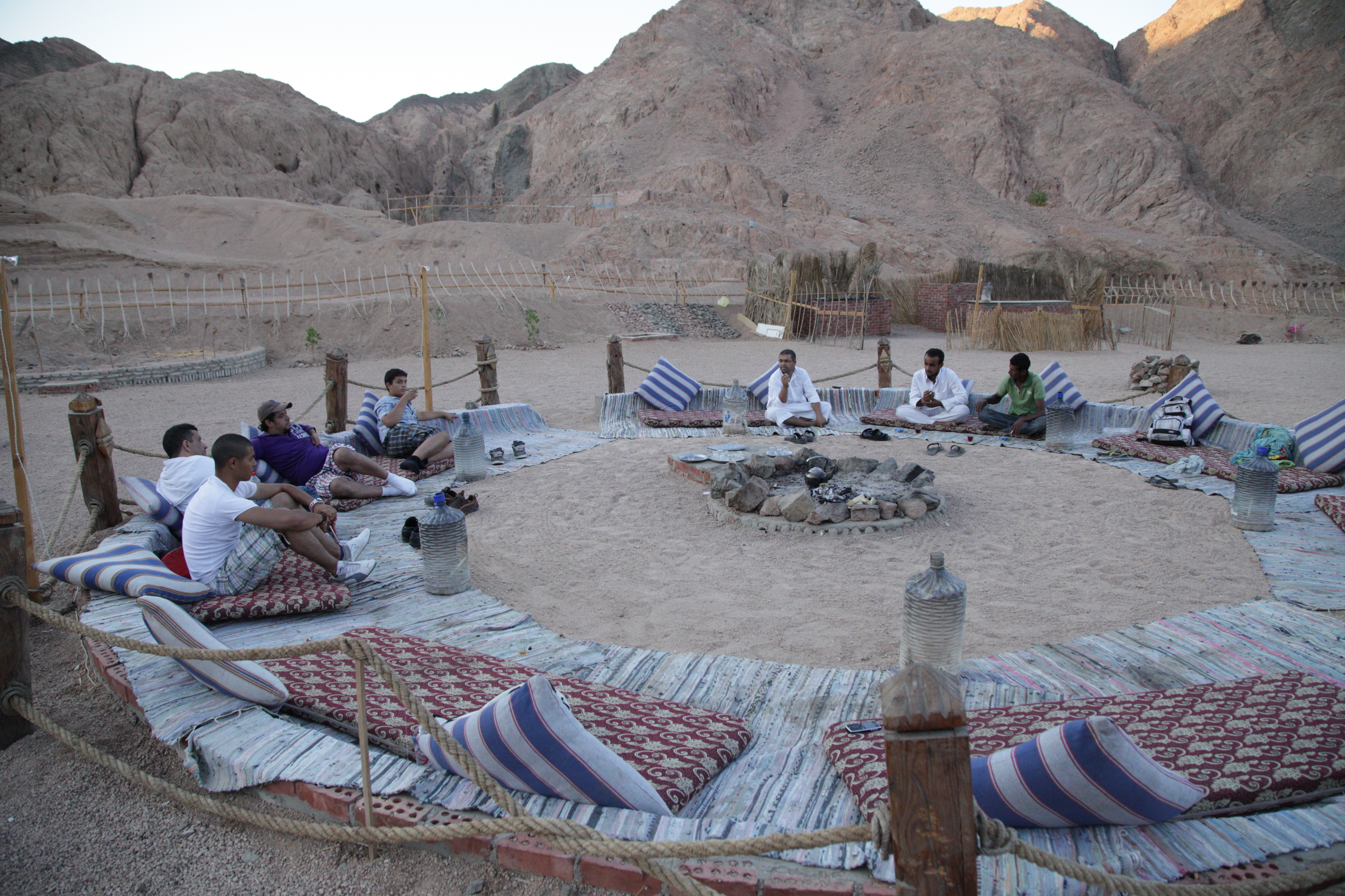 Diner bédouin dans le désert.